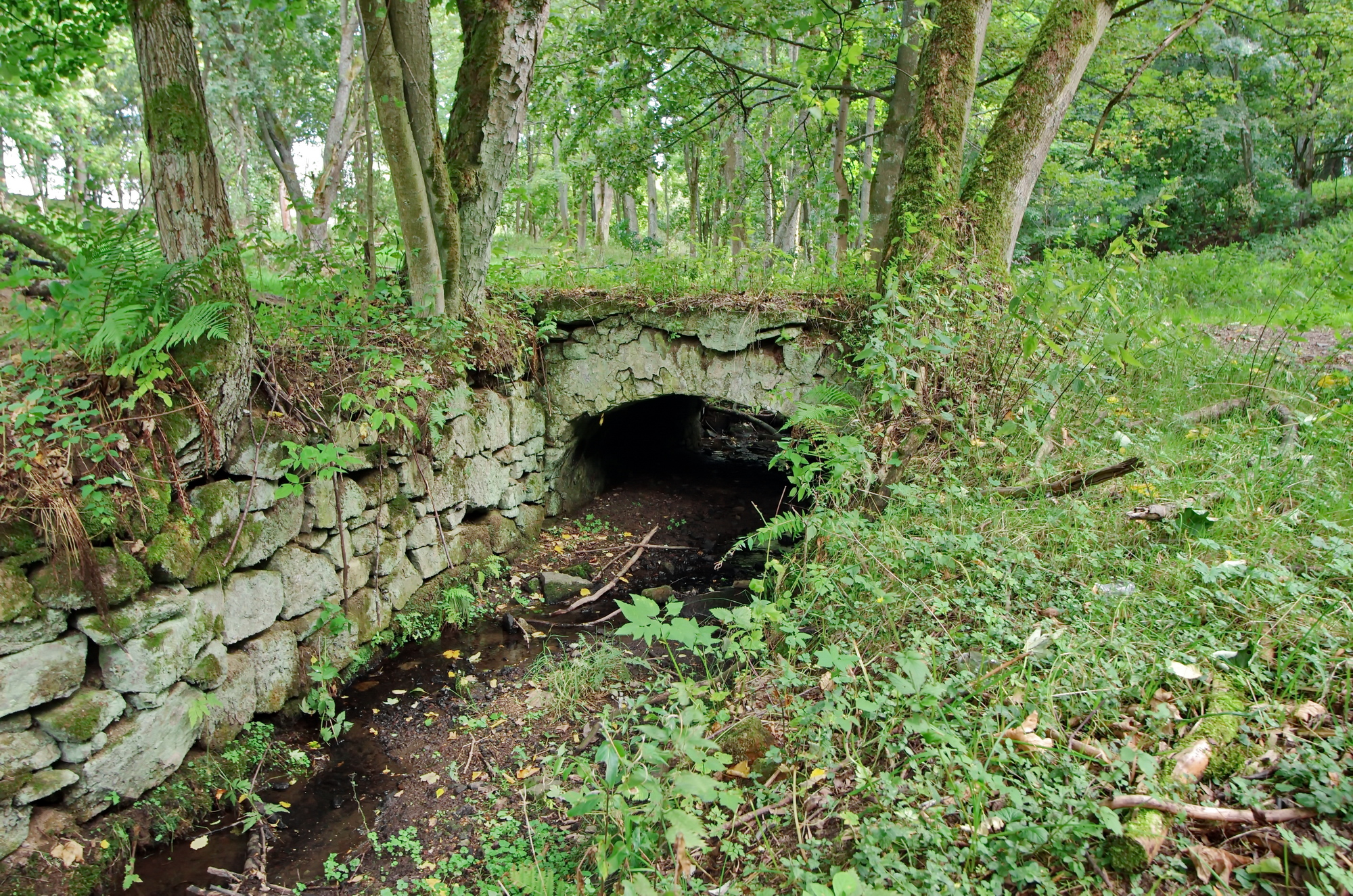 zaniklá obec Smrkovec ve Slavkovském lese, okres Sokolov